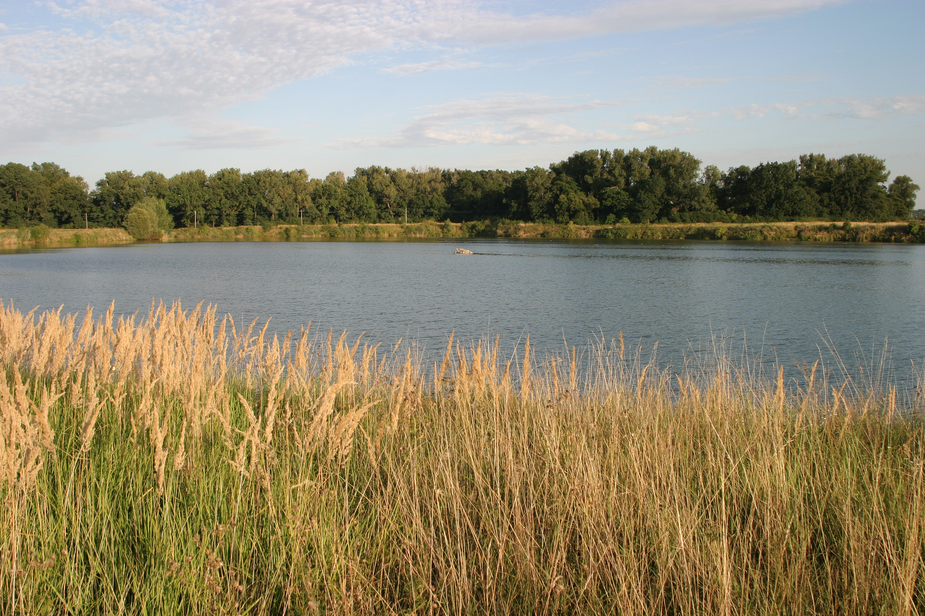 Navrzena prirodni pamatka Cucovna v okresu Praha-vychod